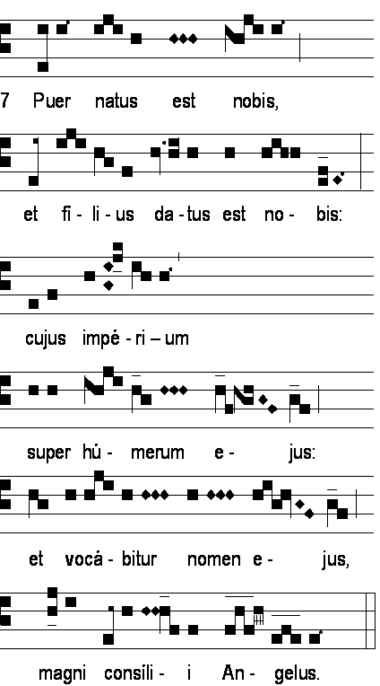 Introït "Puer natus est" de la Messe de Noël (messe du jour)